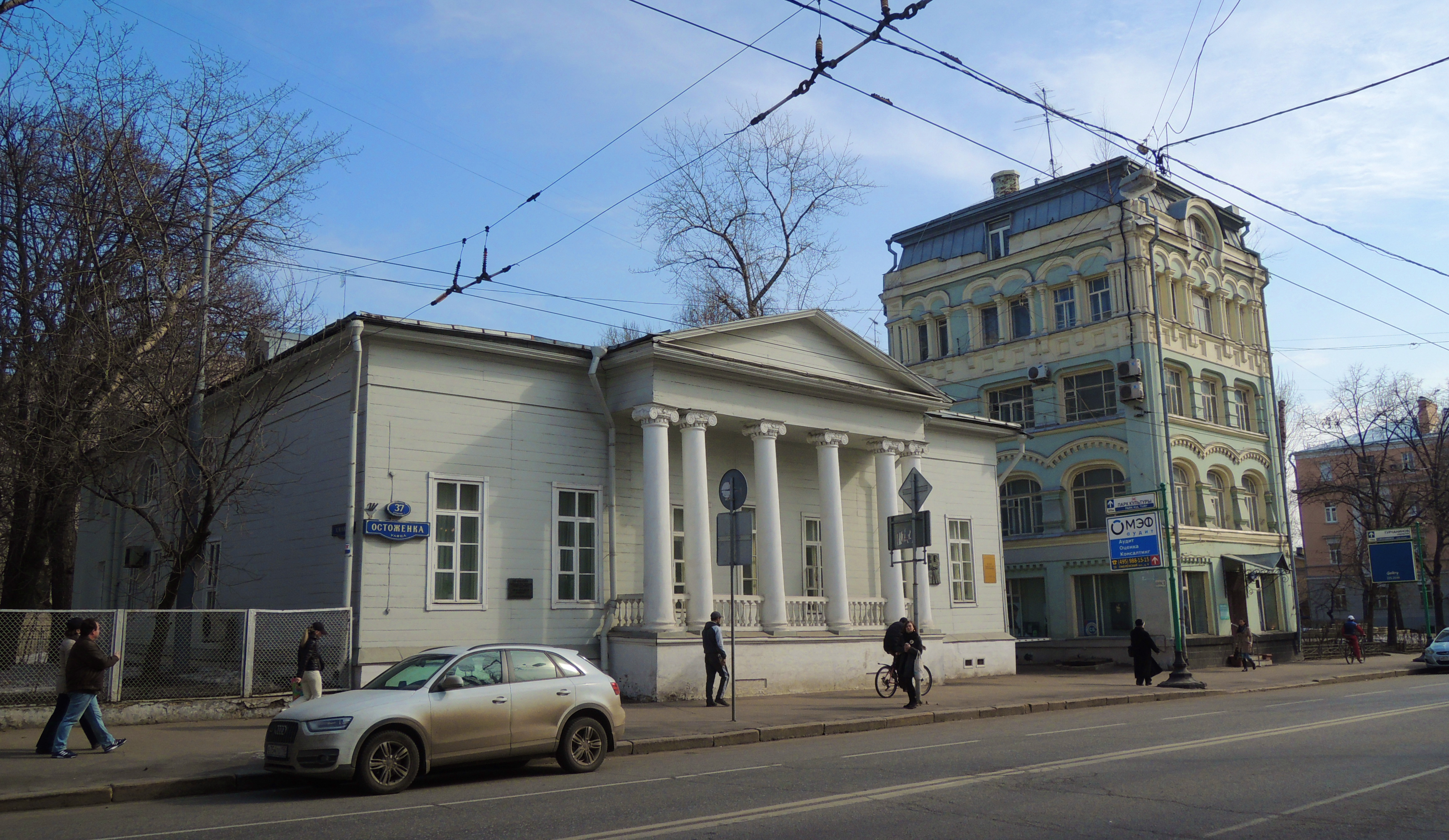 Дом Муму